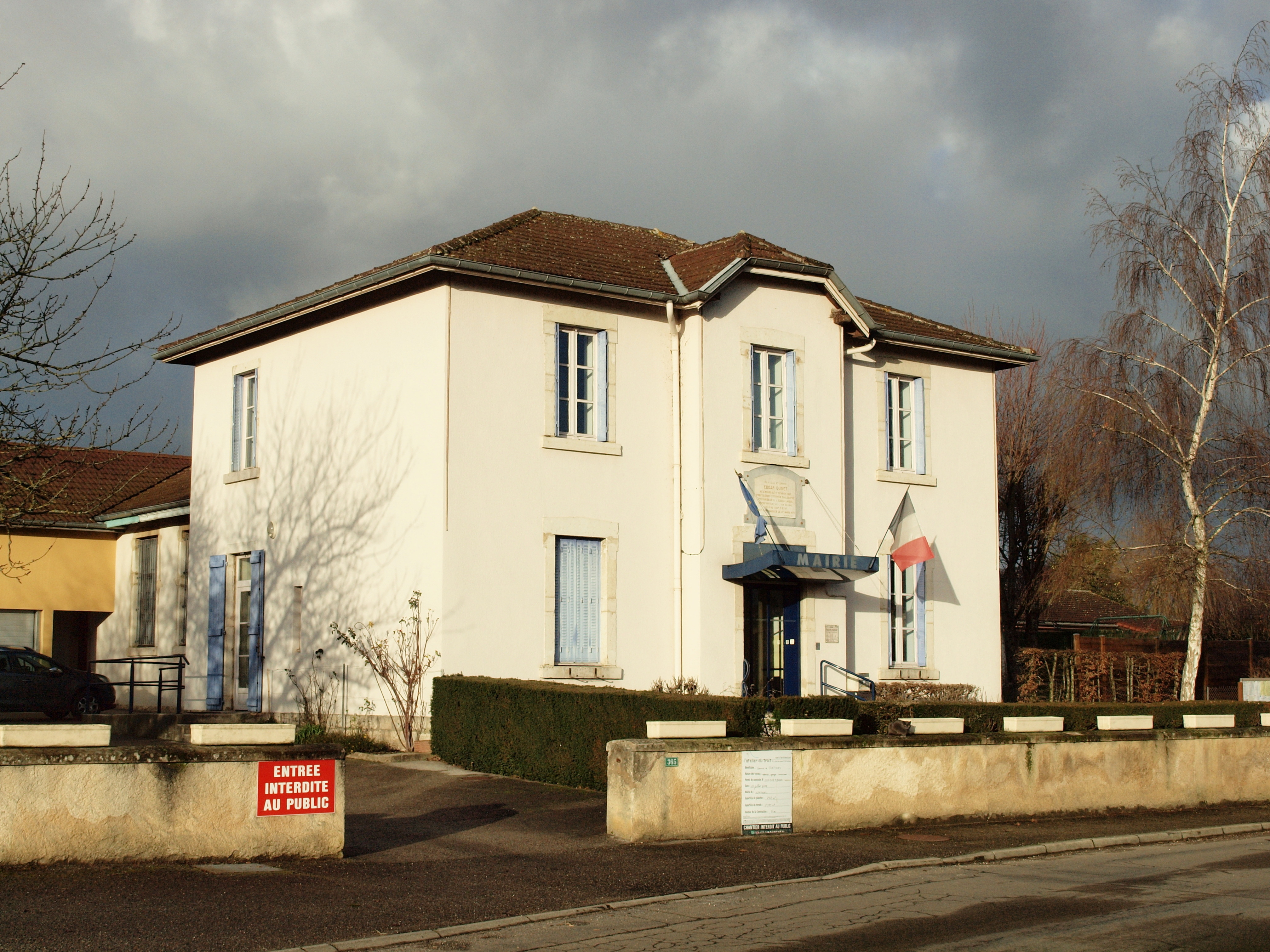 Certines (Ain, France)